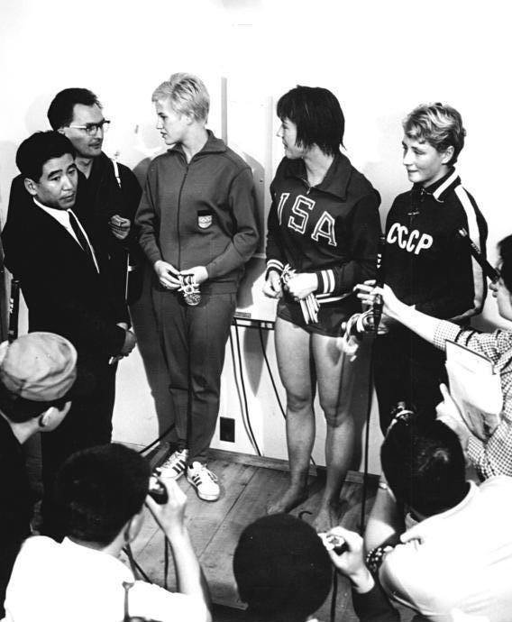 Zentralbild-Kohls 16.10.1964 XVIII. Olympische Sommerspiele 1964 in Tokio. 1. Interview mit den drei Besten im Turmspringen. Die erfolgreichen Medaillengewinnerinen im Turmspringer (v.l.n.r.) Gallina Alexejna (CSSR, Bronze), Lesley Bush (USA, Gold) und Ingrid Engel-Krämer (DDR, Silber) werden im Interviewraum vom Pressefotografen und Journalisten umringt.